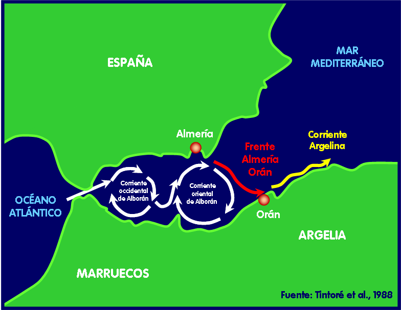 Corriente Almería-Orán